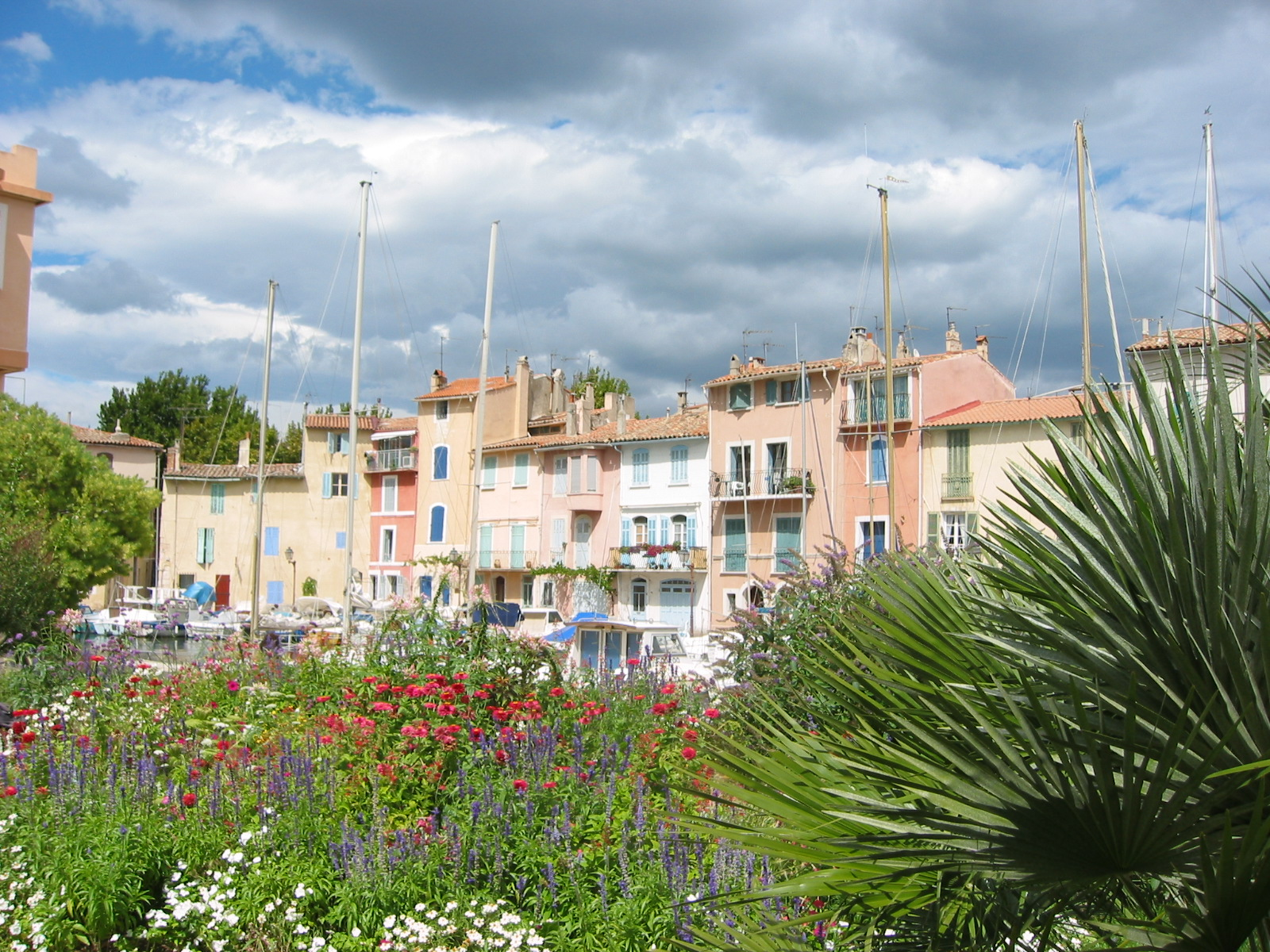 Martigues, Bouches-du-Rhône, France Quartier de l'île sur le canal